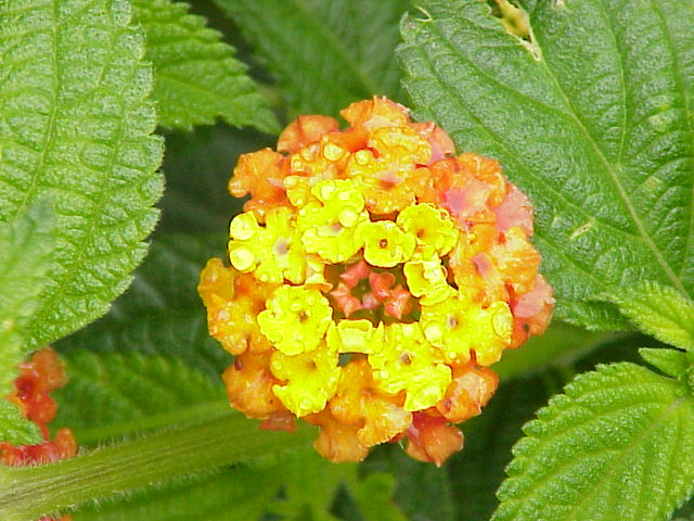 Species: Lantana camara Family: Verbenaceae Image No. 6